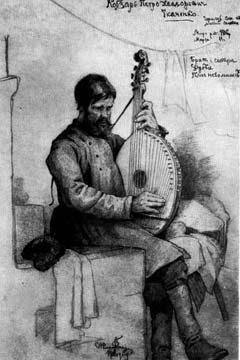 Petro Tkachenko